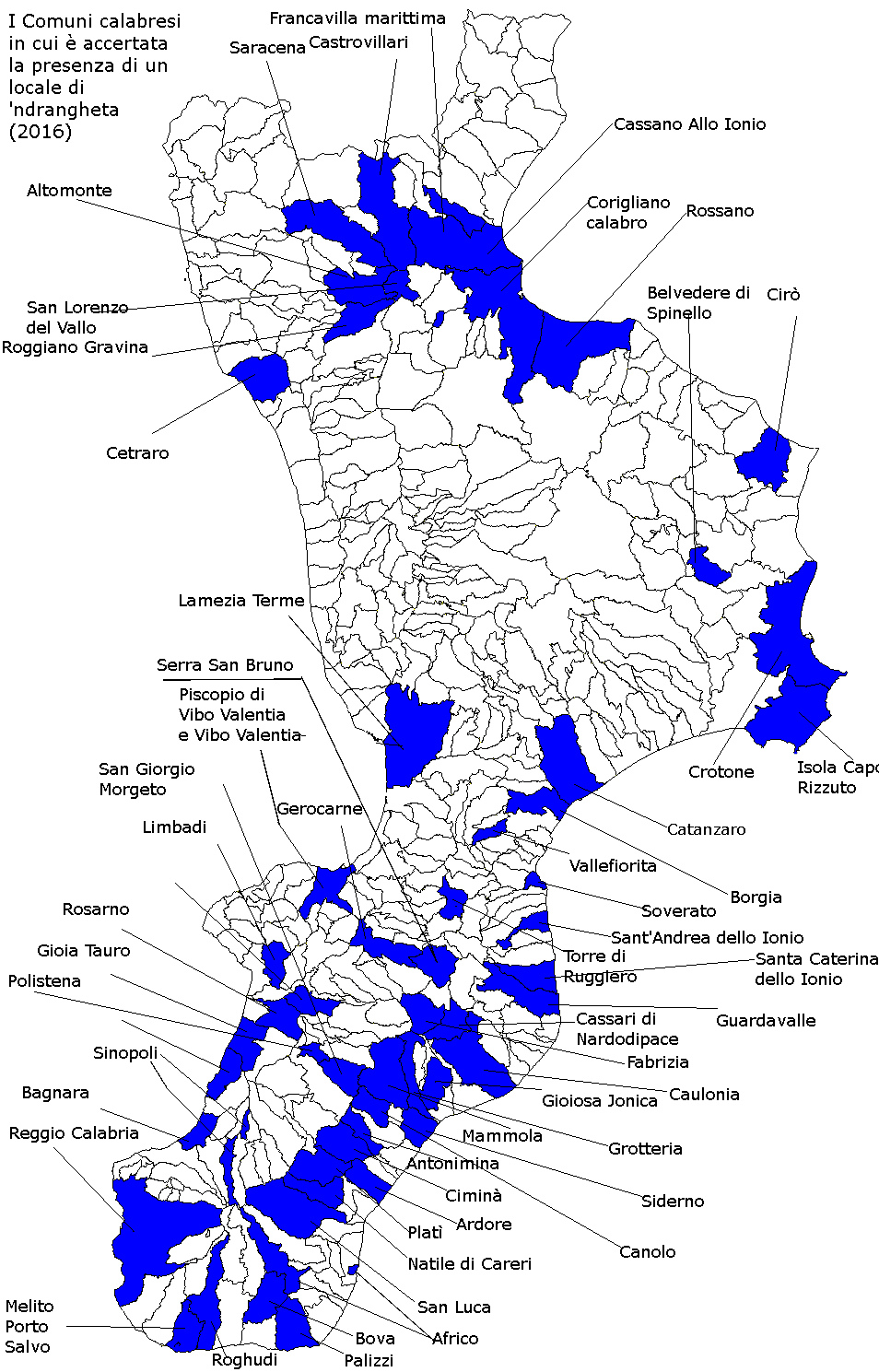 Locali di ndrangheta della Calabria 2016